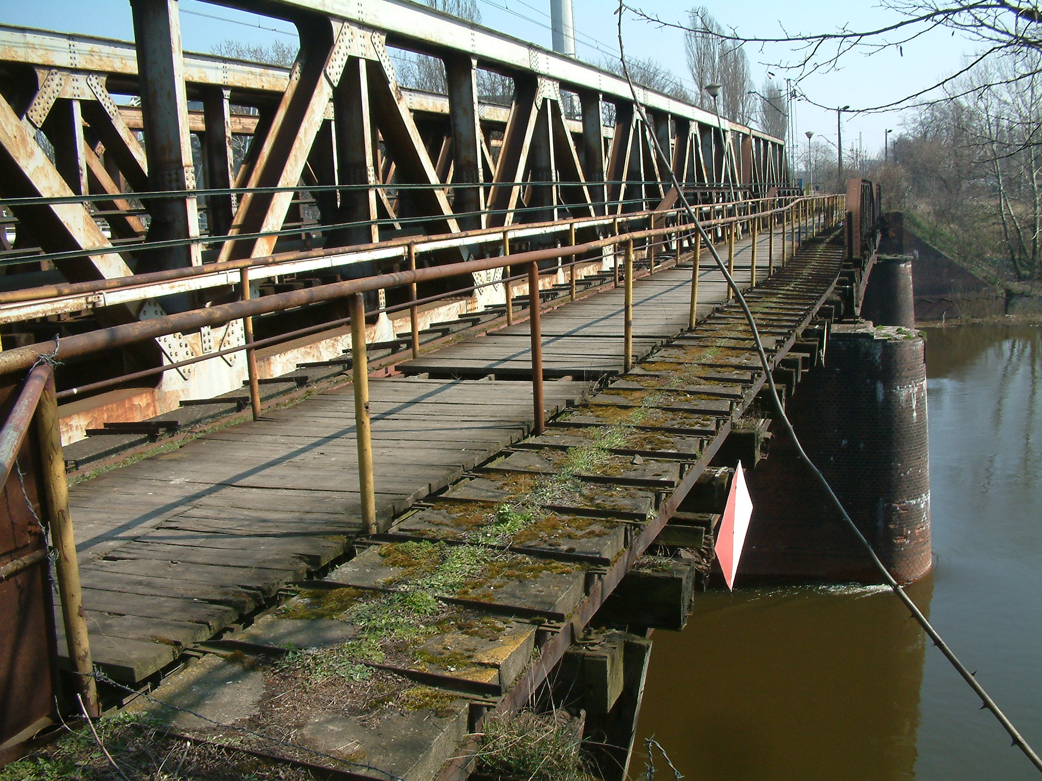 Most Kolejowy na linii Bydgosko-Toruńskiej Poznaniu (Rail Bridge on Toruń-Bydgoszcz line in Poznań)